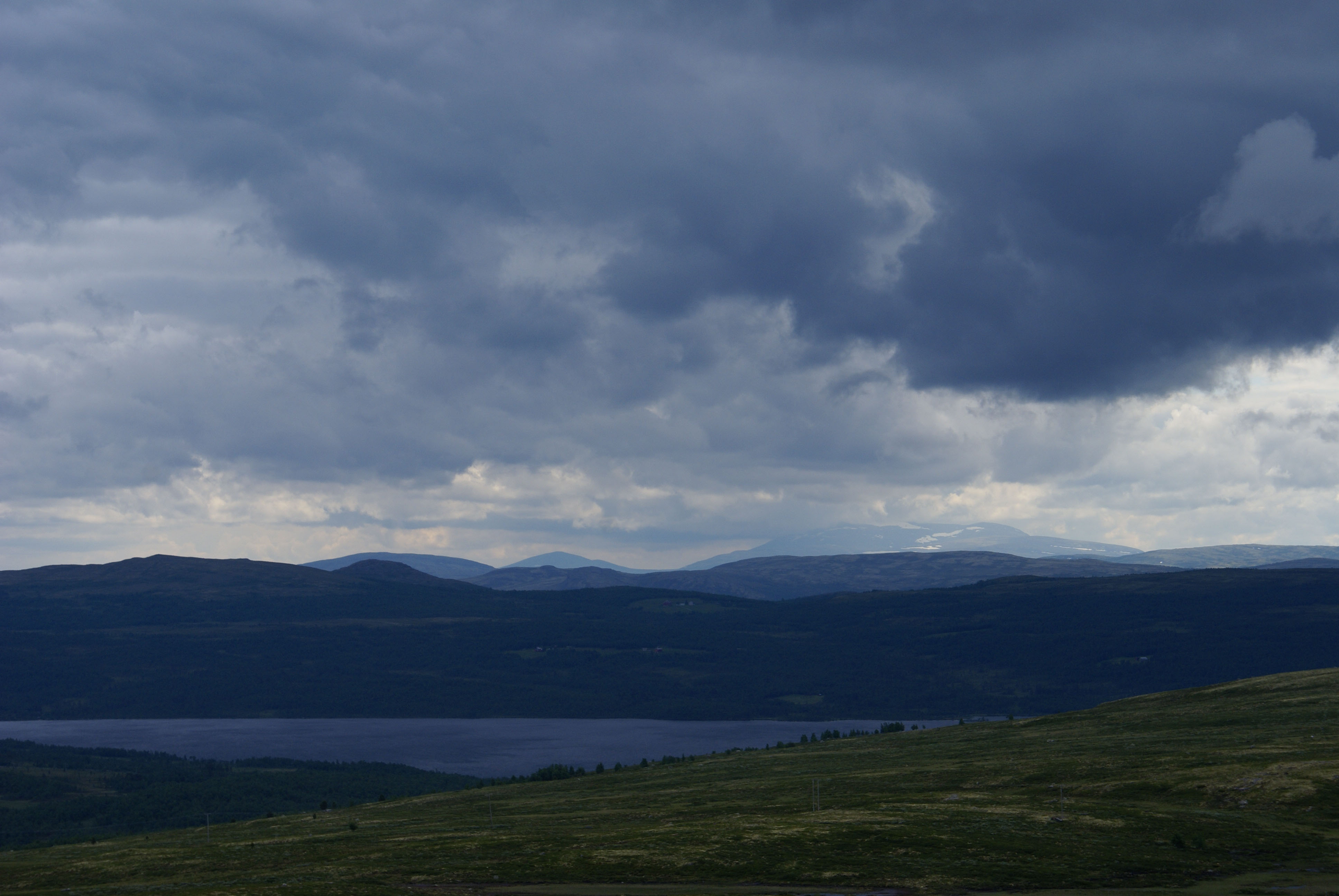 From Rørosvidda, Norway